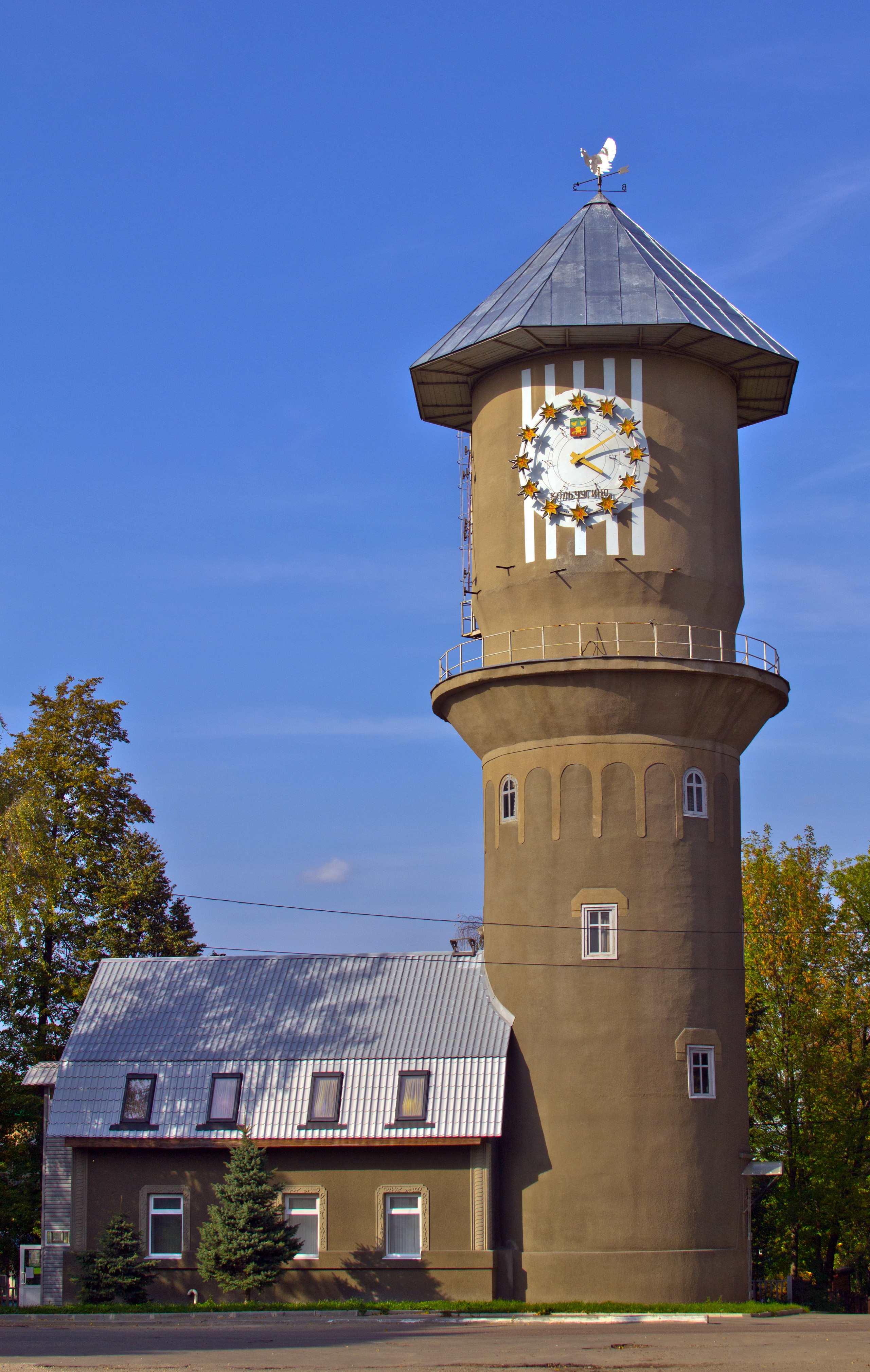 Водонапорная башня в г. Кольчугино Владимирской обл. фото сделано 12.09.2012г. Но место нахождения этой башни не там где указано в базе конкурса.Улица 50 лет СССР около школы №7.